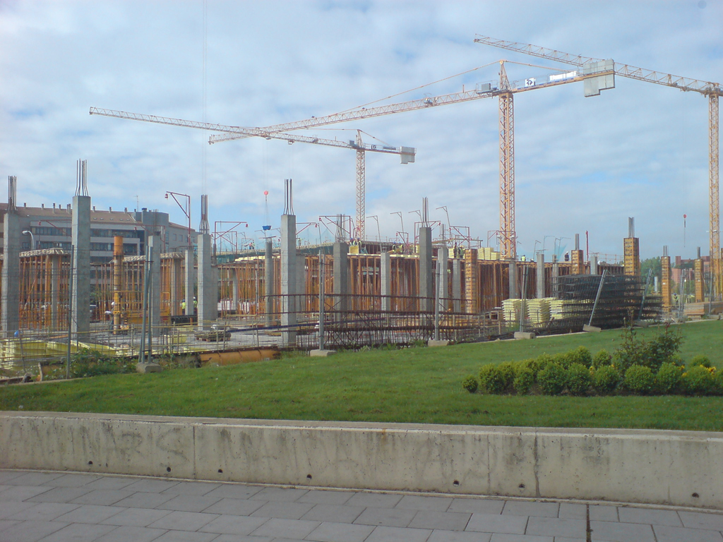 León Plaza en construcción